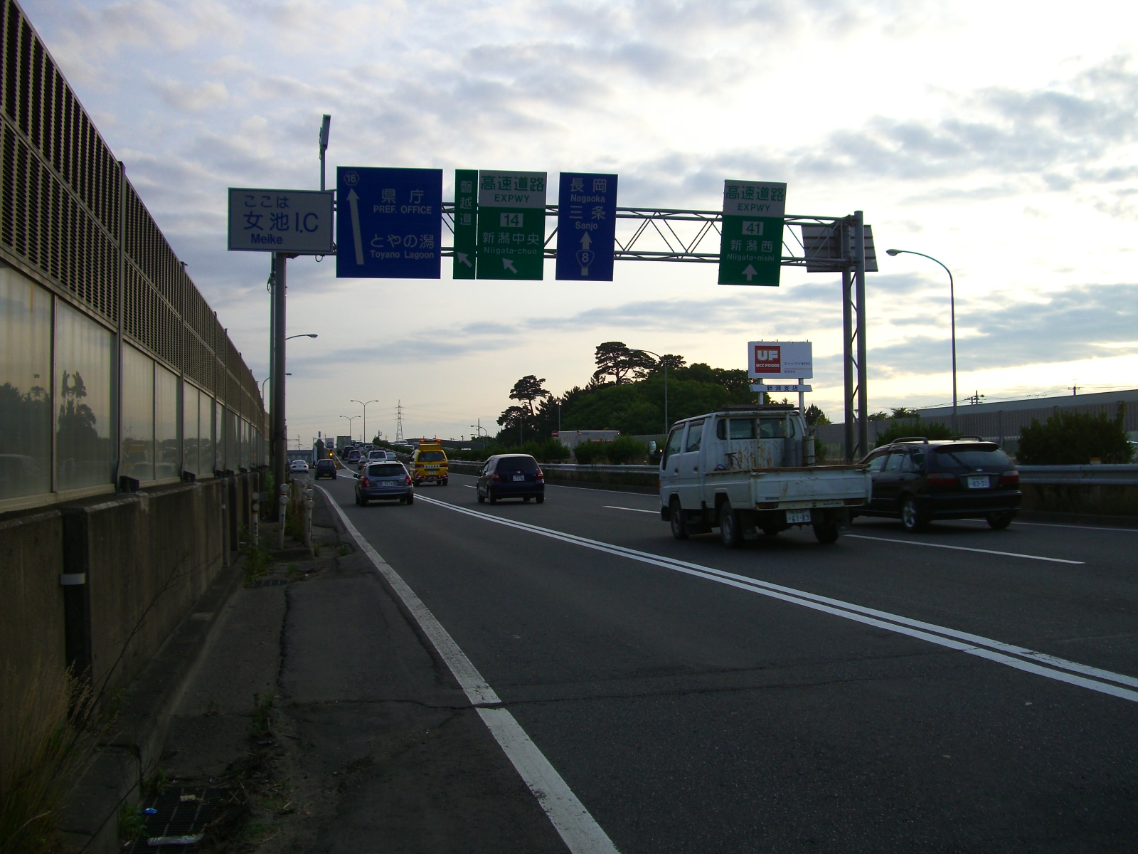 新潟バイパス女池IC